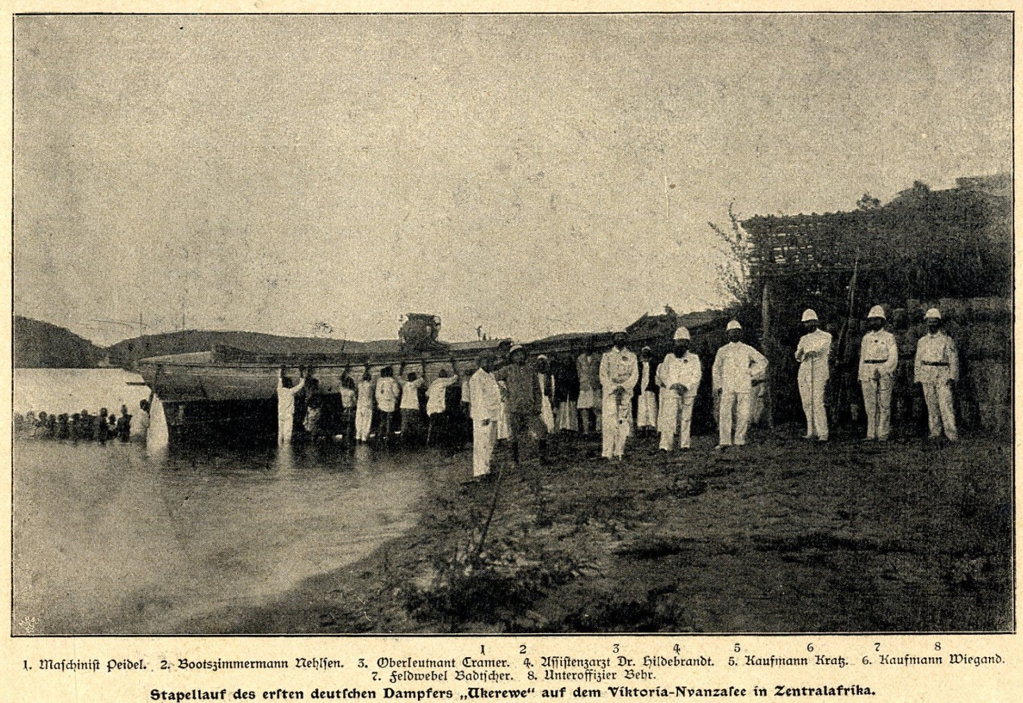 Stapellauf des ersten deutschen Dampfers 'Ukerewe' auf dem Viktoriasee,1900